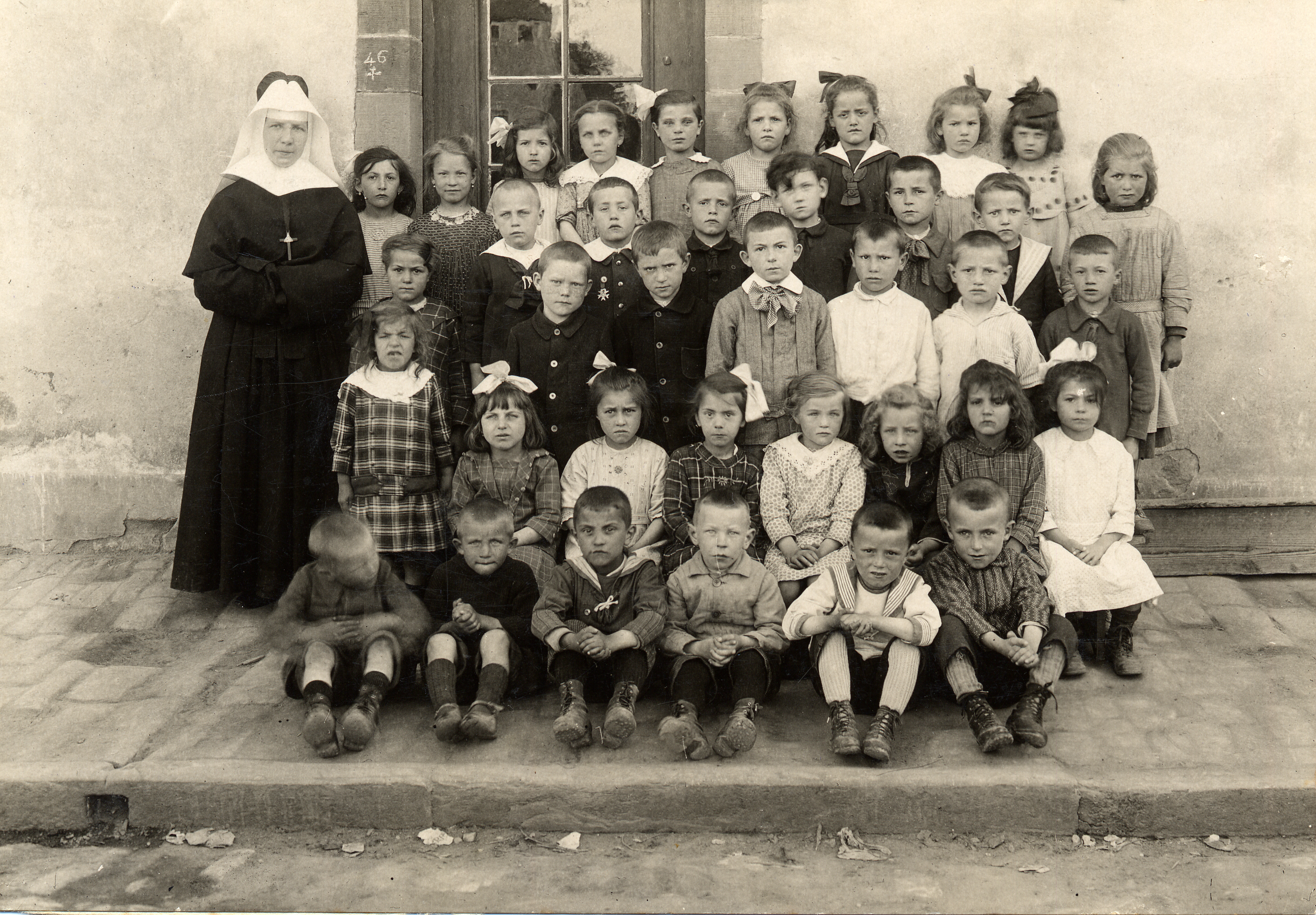 Wasselonne, une classe d’enfants de l'école catholique en 1925.